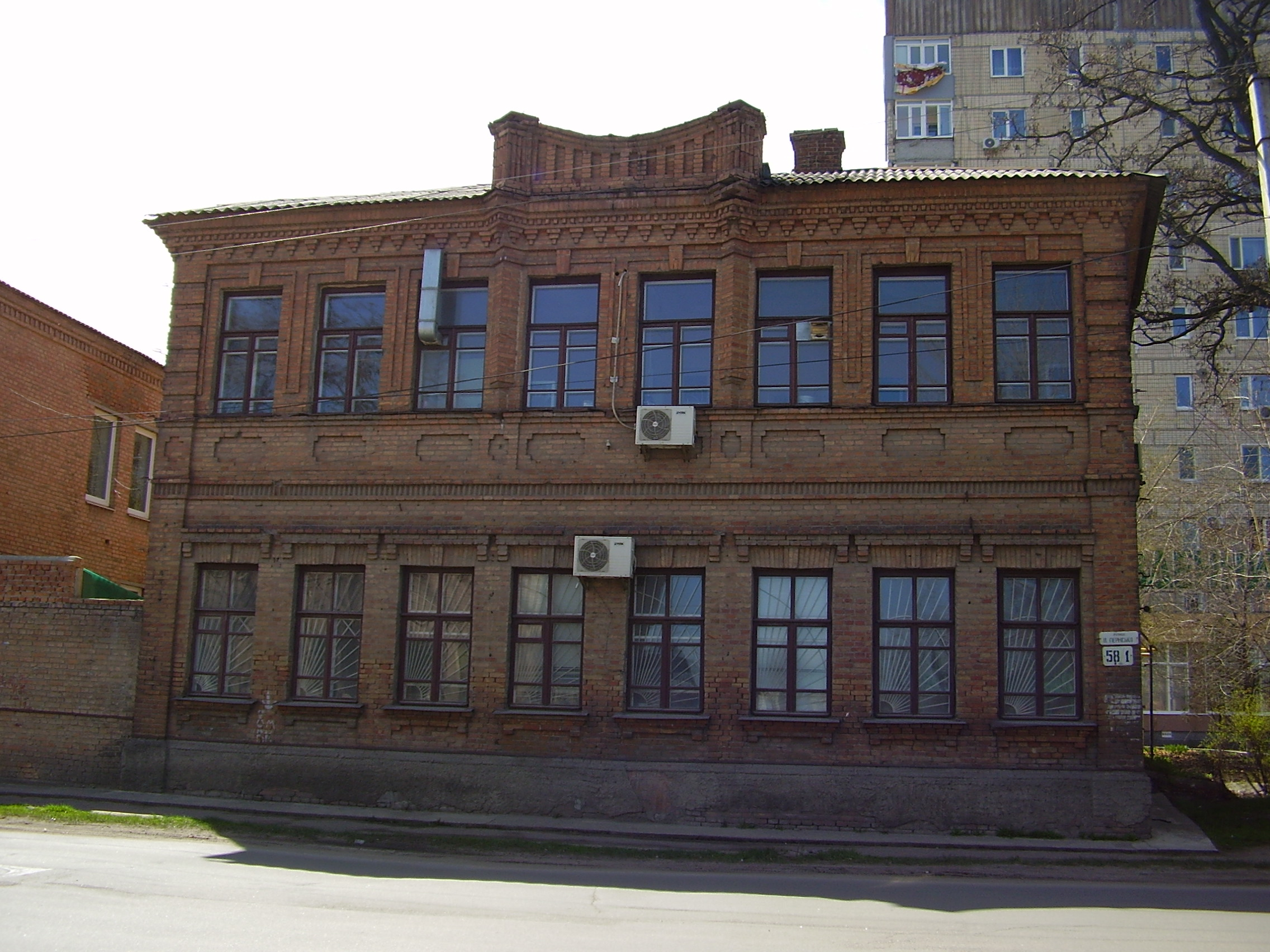 Житловий будинок, Кіровоград, вул. Велика Пермська, 58